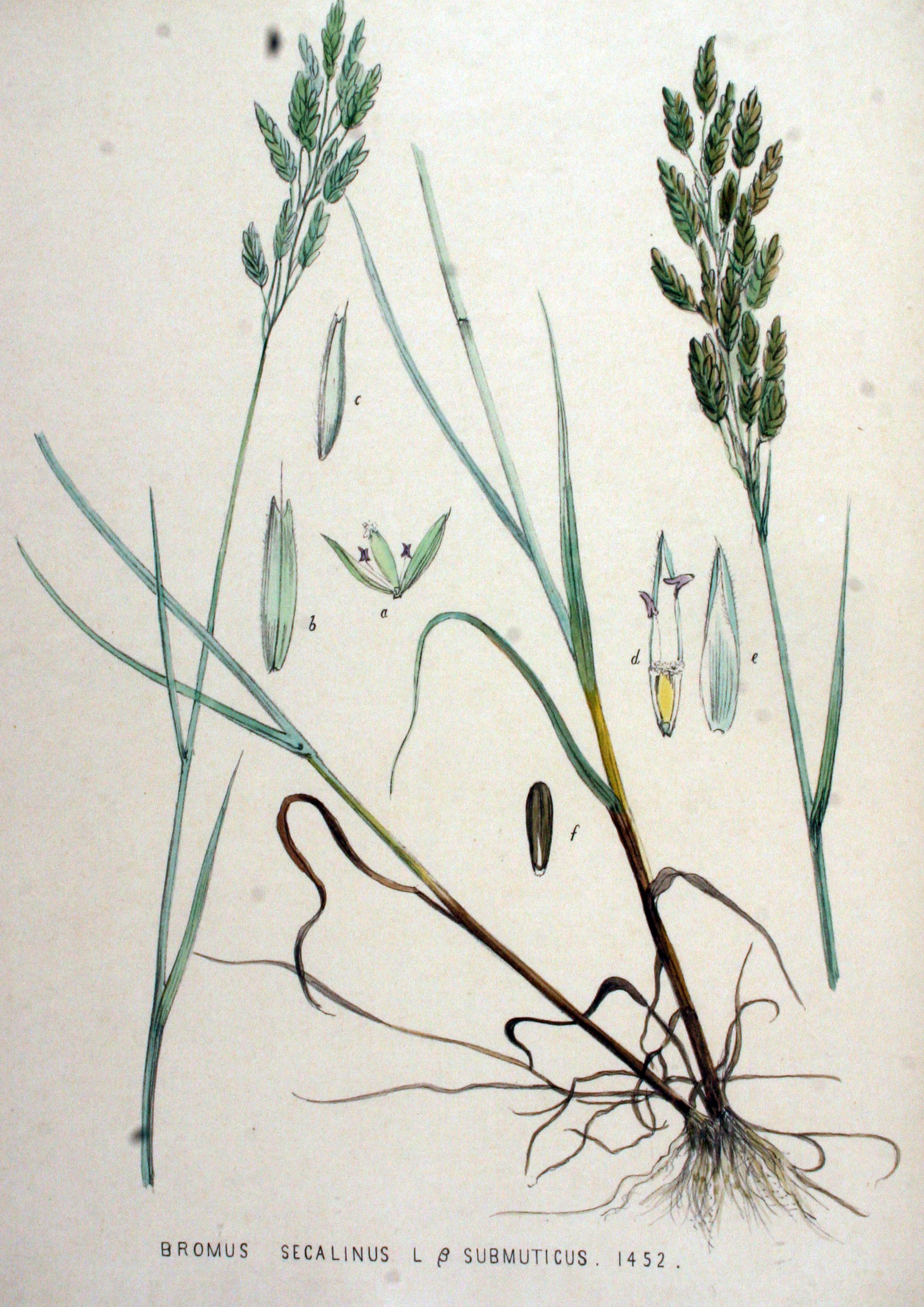 Bromus secalinus L. var. submuticus Reichenb.